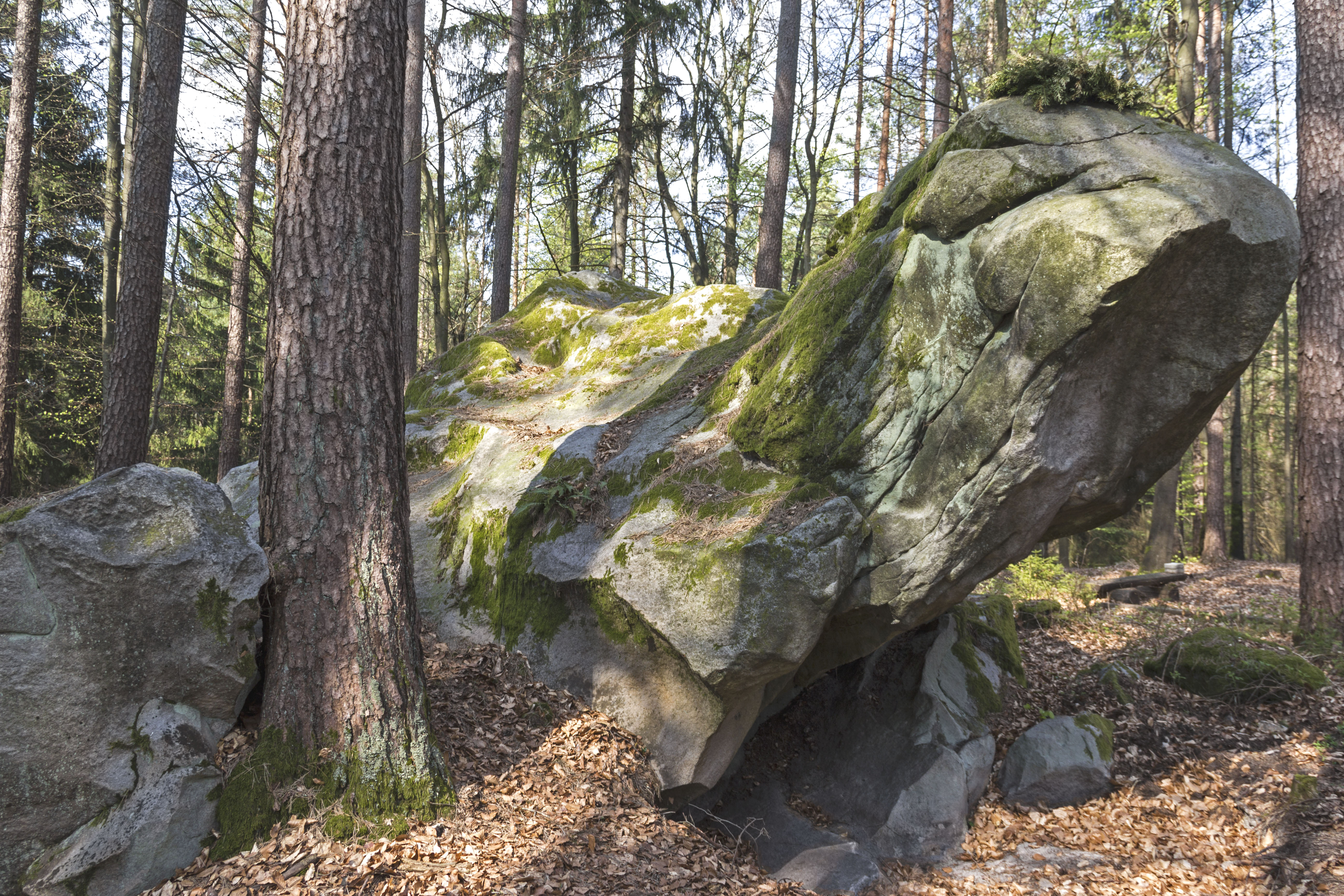 Kallmünzer, Zyprianstein, Geotop, Rinnenbrunn, Naturpark Fränkische Schweiz-Veldensteiner Forst